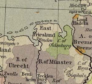 Oost-Friesland 1477